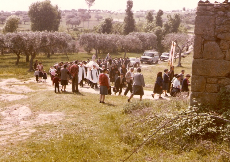 Chegada de Proença-a-Velha, de procissão rogatória a N.S.da Granja.